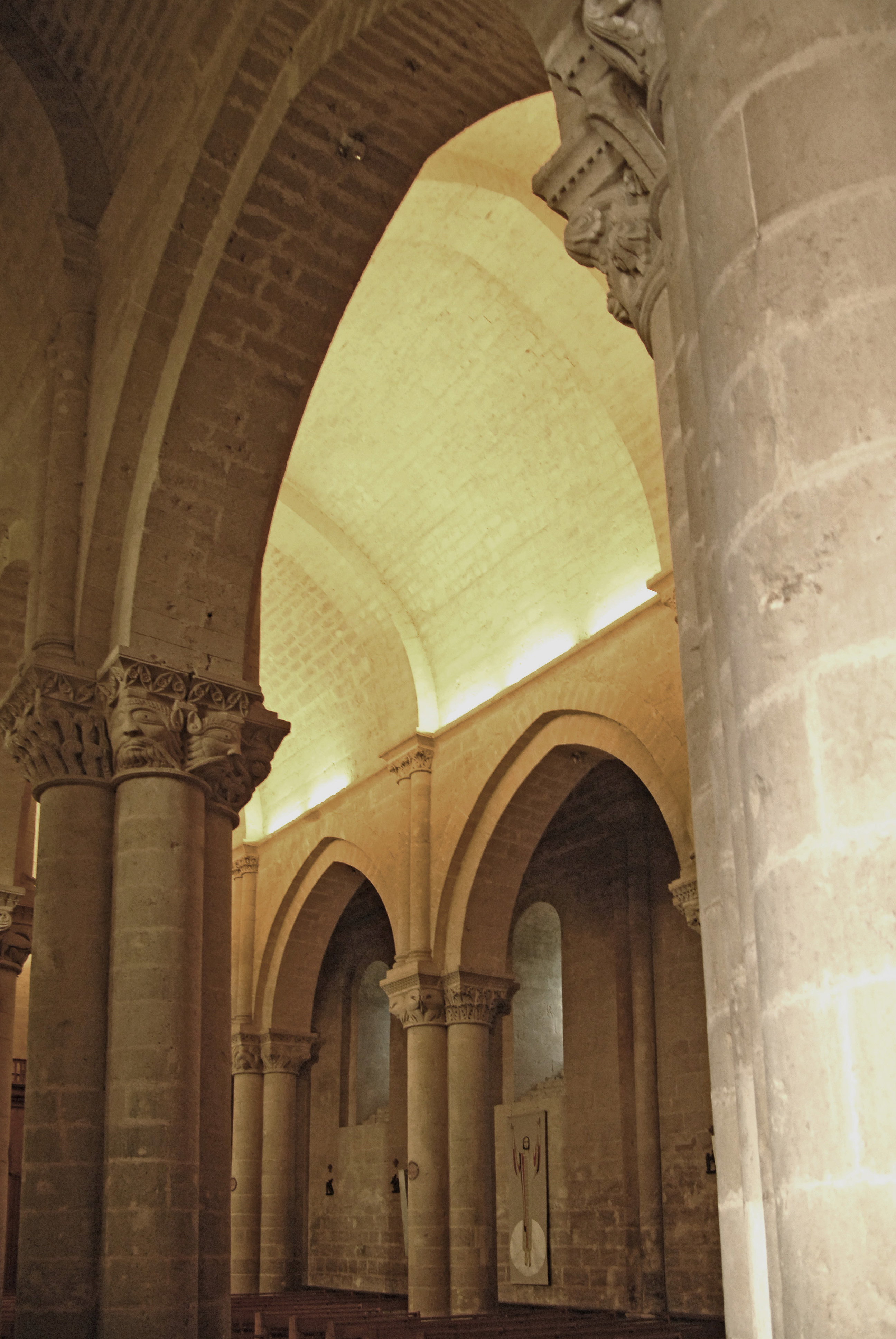 St.-Pierre Aulnay, Scheidewände u. Scheidbögen